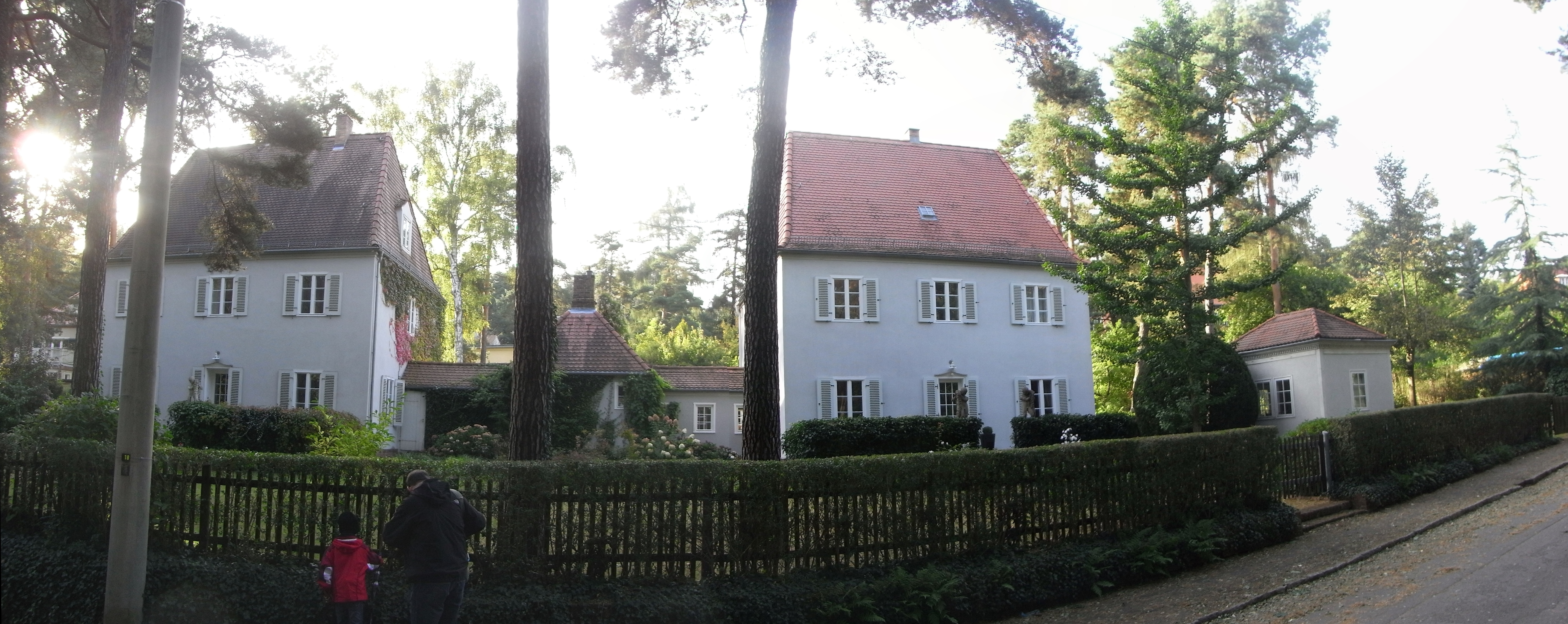 Zwei verbundene Einfamilienhäuser im Heideweg in Dresden-Hellerau. Architekt Heinrich Tessenow 1910